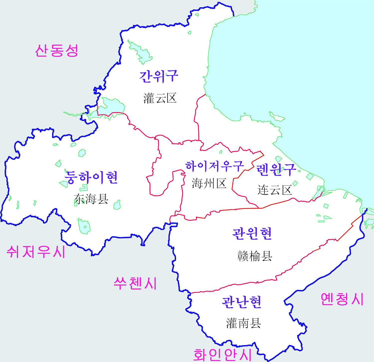 렌윈강시 행정구역